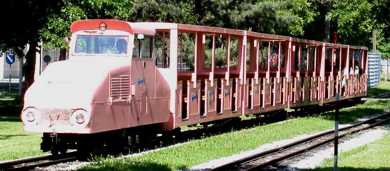 Diesellokomotive der Liliputbahn im Wiener Prater